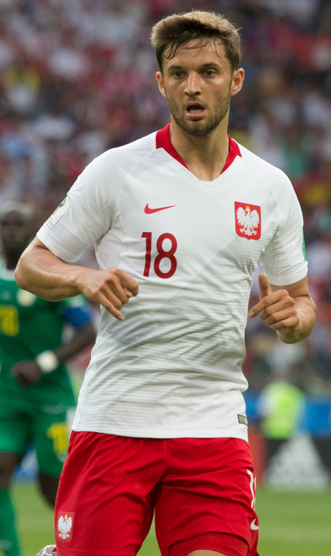 Польша неожиданно проиграла Сенегалу